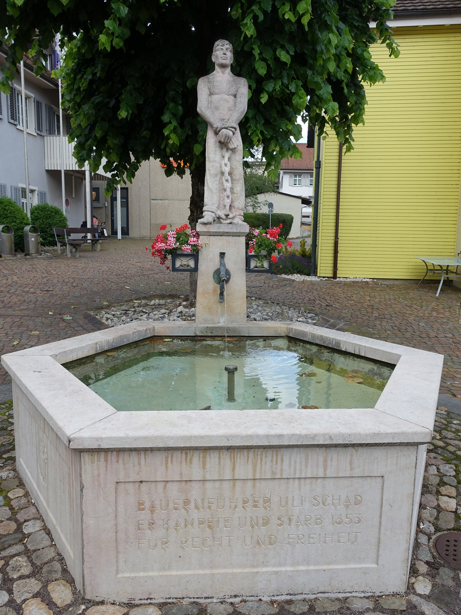 Uli-Schad Brunnen in Oberdorf, Baselland, Schweiz. Geschaffen von Fritz Bürgin.